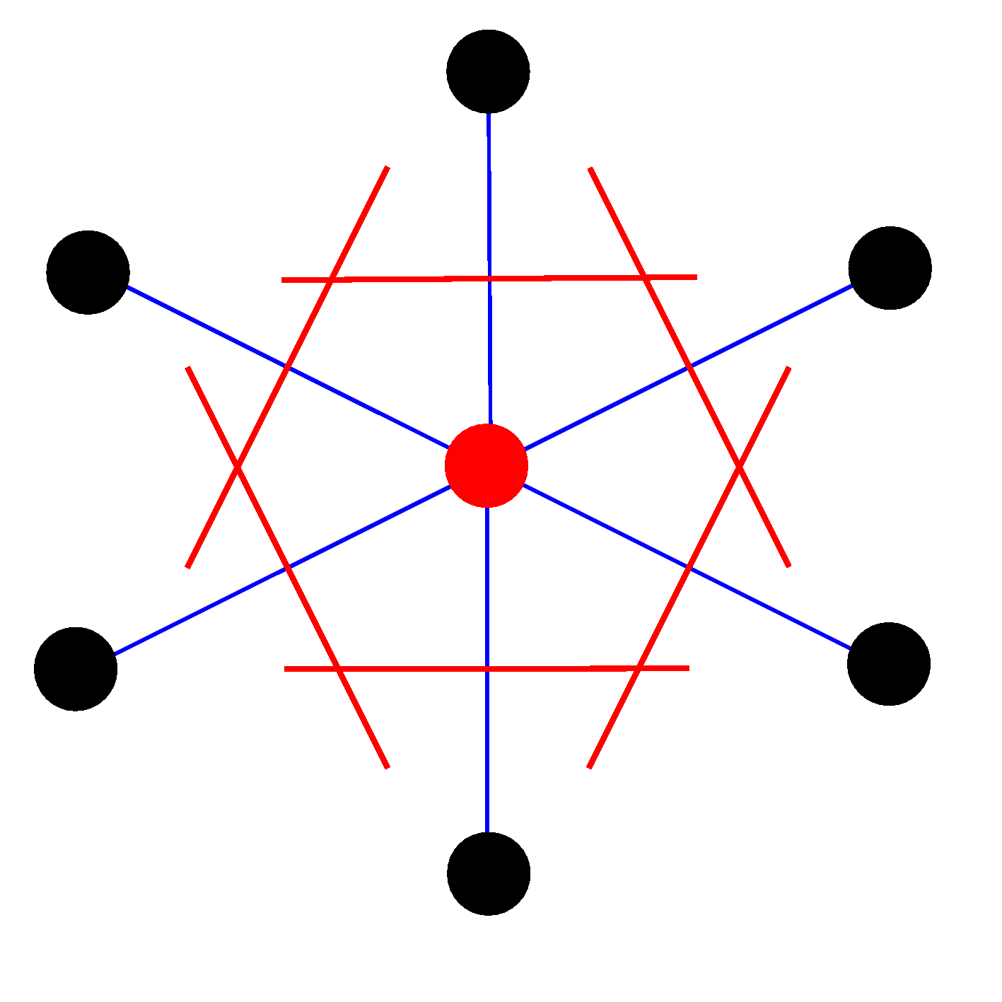 Zur Konstruktion einer Wigner-Seitz-Zelle